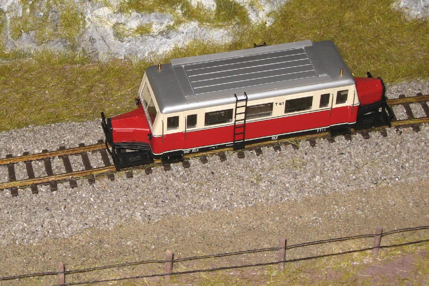 Ausschnitt aus einem privaten Diorama in der Spur H0m im September 2011. Modell des Wismarer Schienenbus der Bauart Hannover Nummer T 41 der ehemaligen Steinhuder Meer-Bahn (StMB) der sich Heute in der Obhut des Deutscher Eisenbahn-Vereins (DEV) befindet von BEMO.